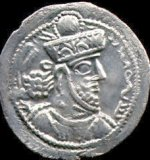 Pièce du règne de Shapur III